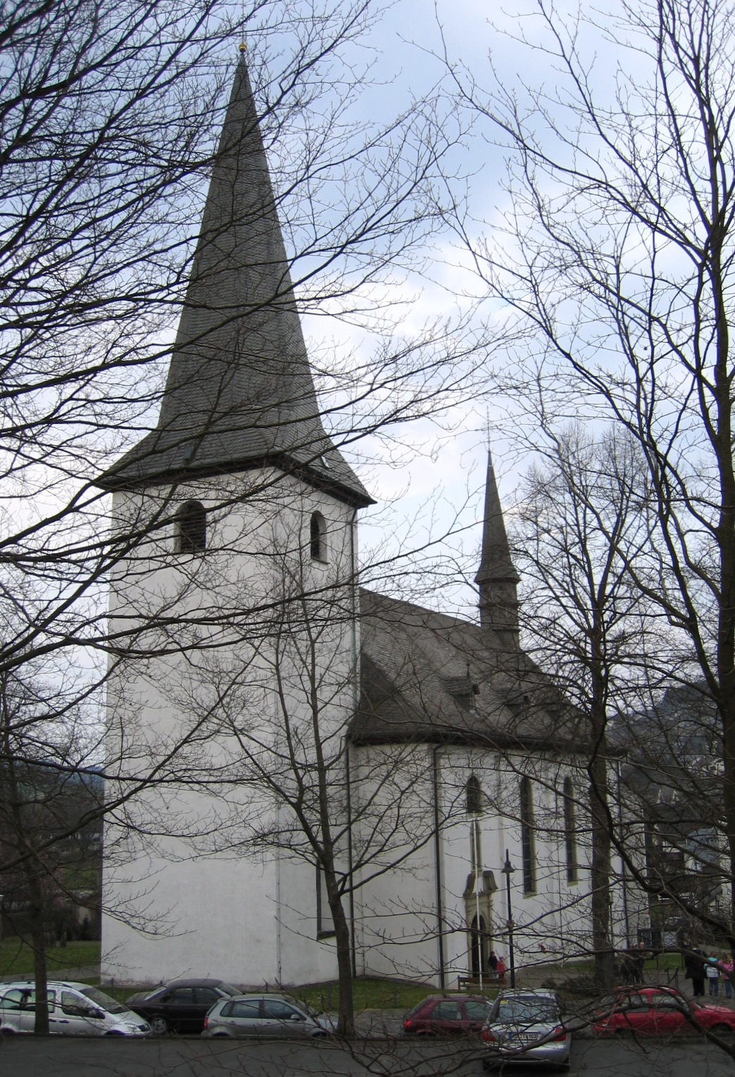 Katholische Pfarrkirche „St. Peter und Paul“ in Eslohe.